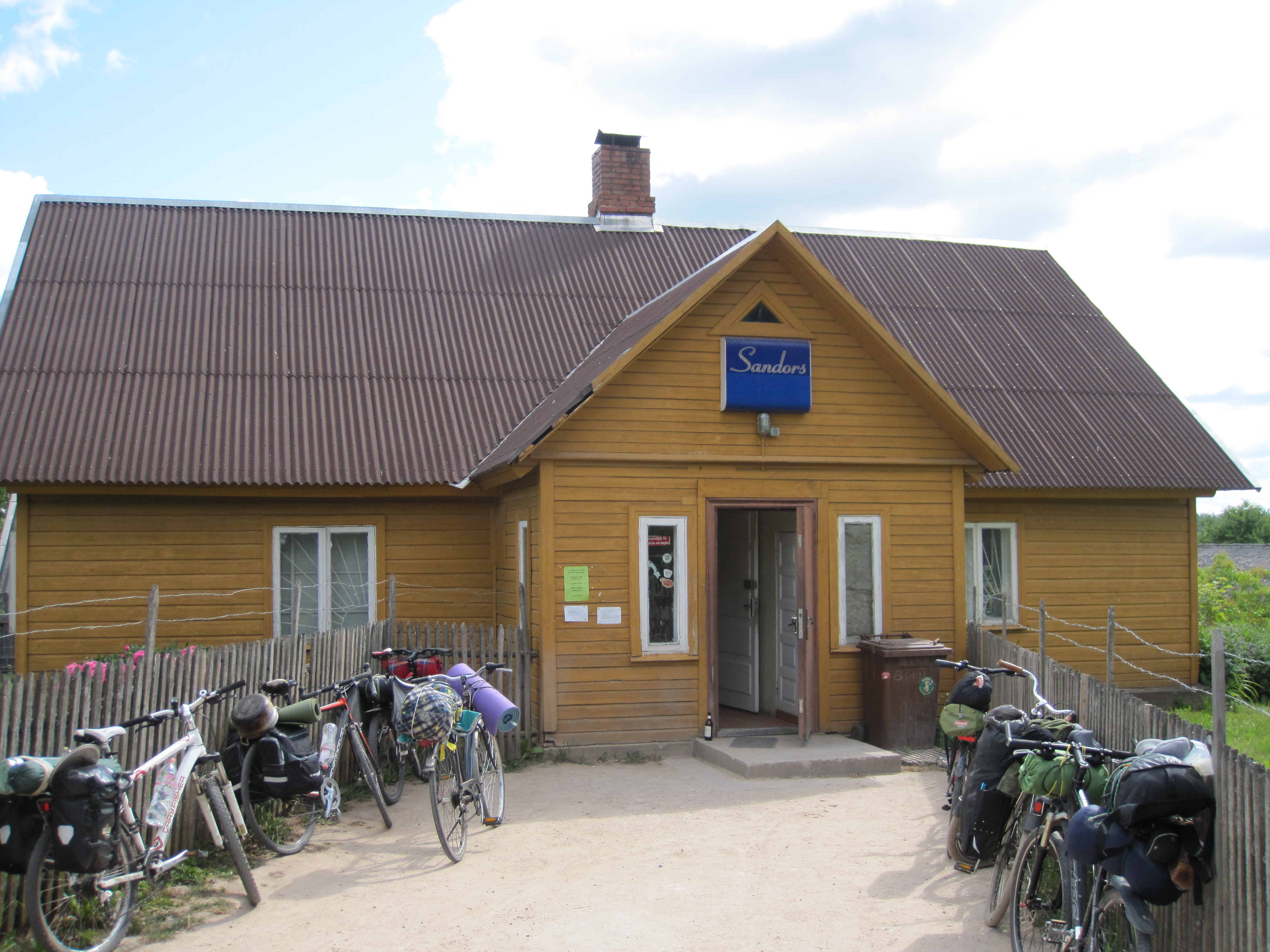 Veikals "Sandors" Brencos, 10.06.2016